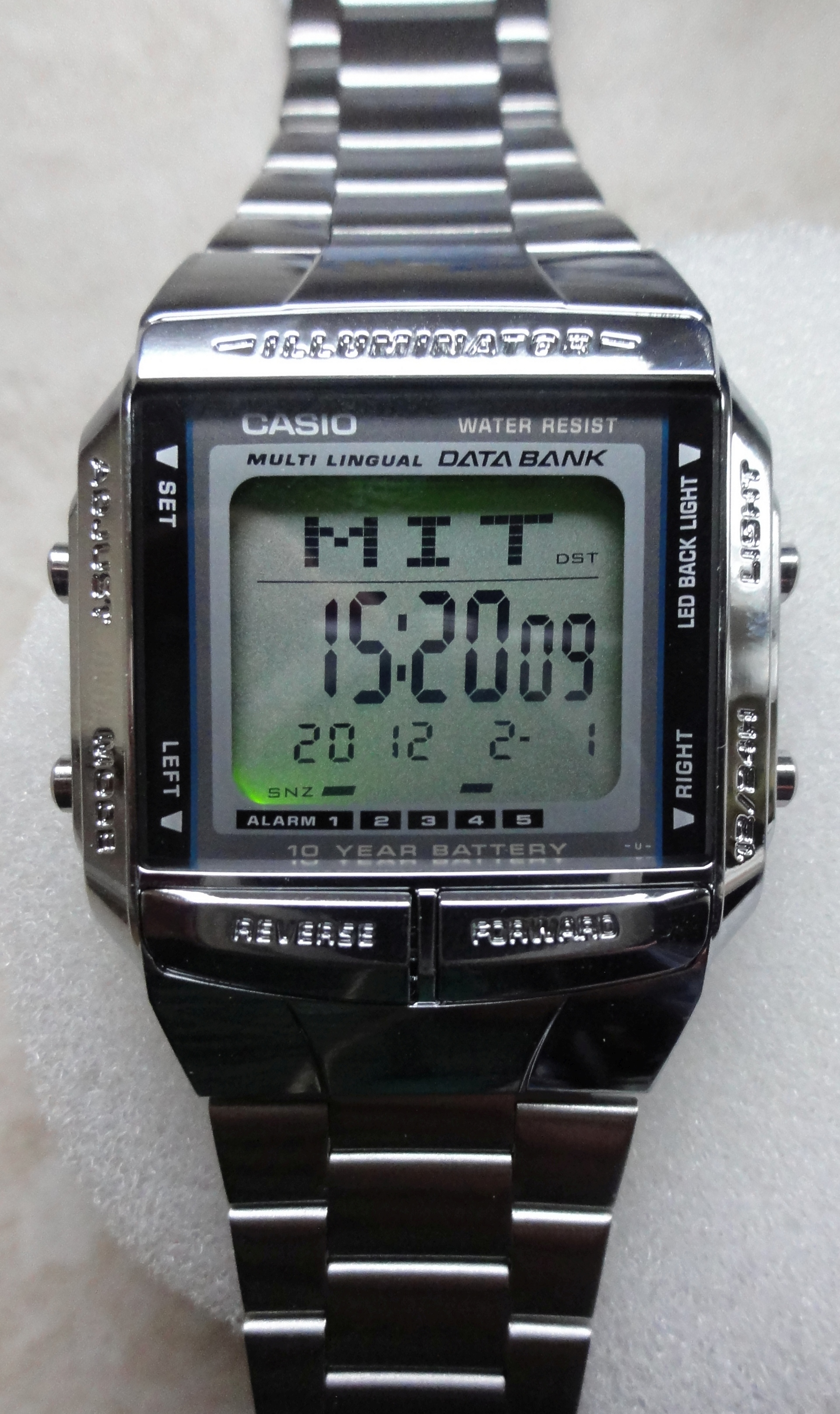 Armbanduhr Casio DB-360N-1AEF, Bj. 2012